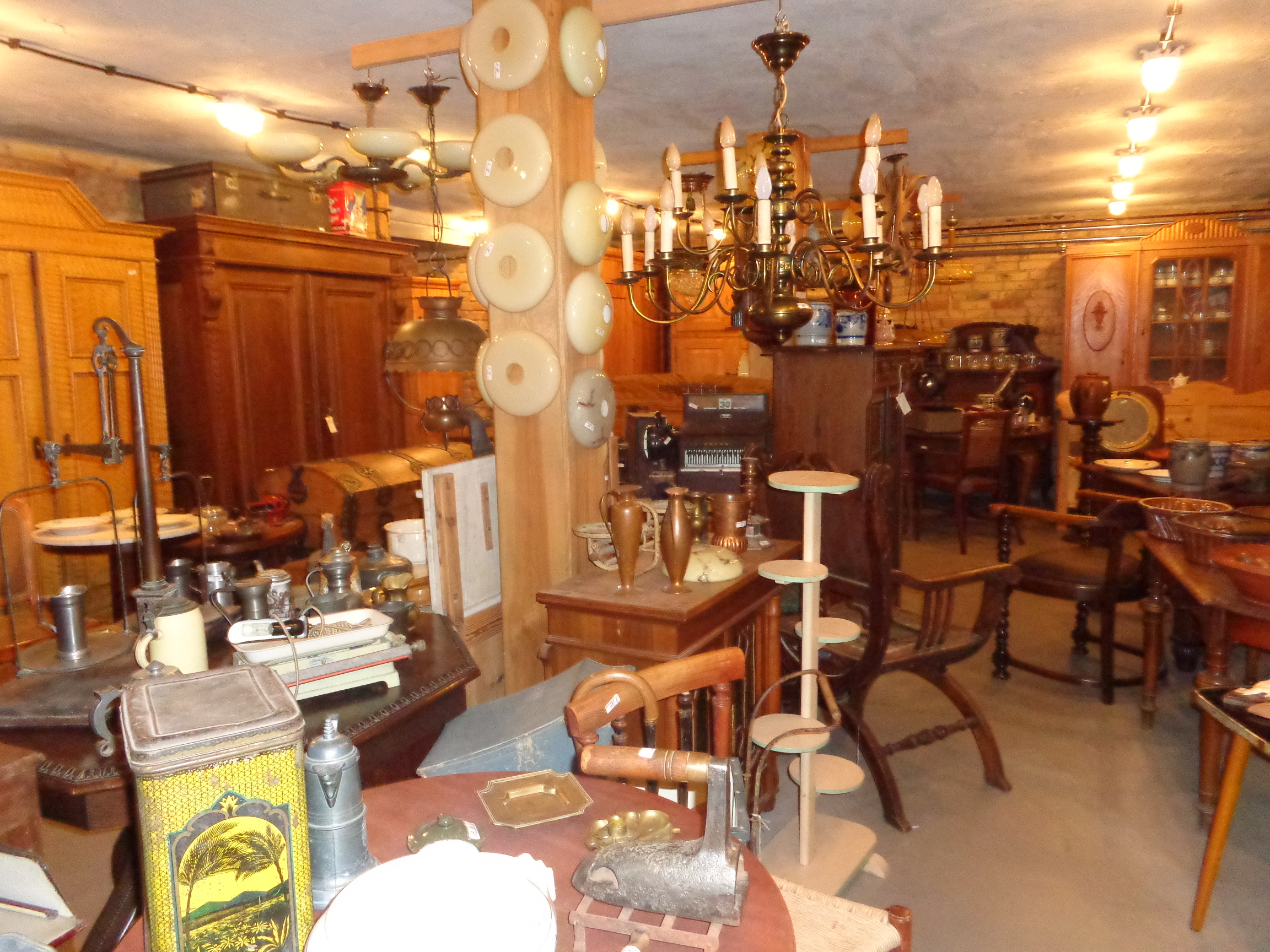 Ausstellungsraum eines Altmöbelhändlers in Plau am See